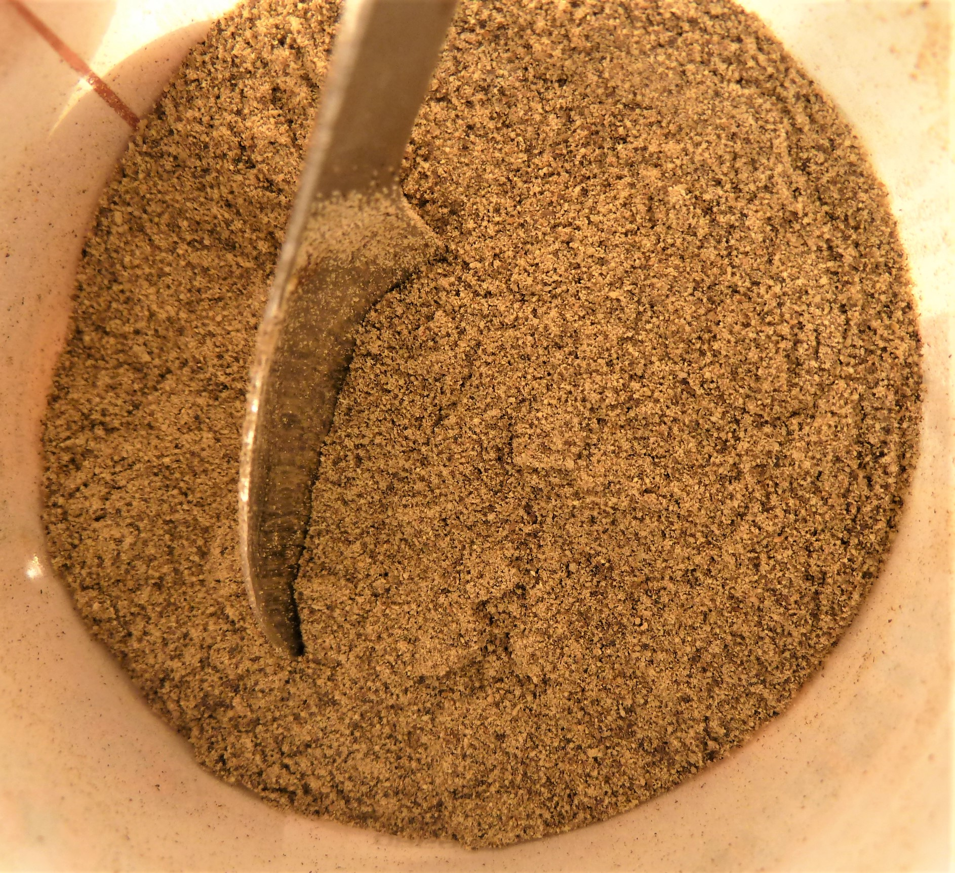 ఆవపిండి